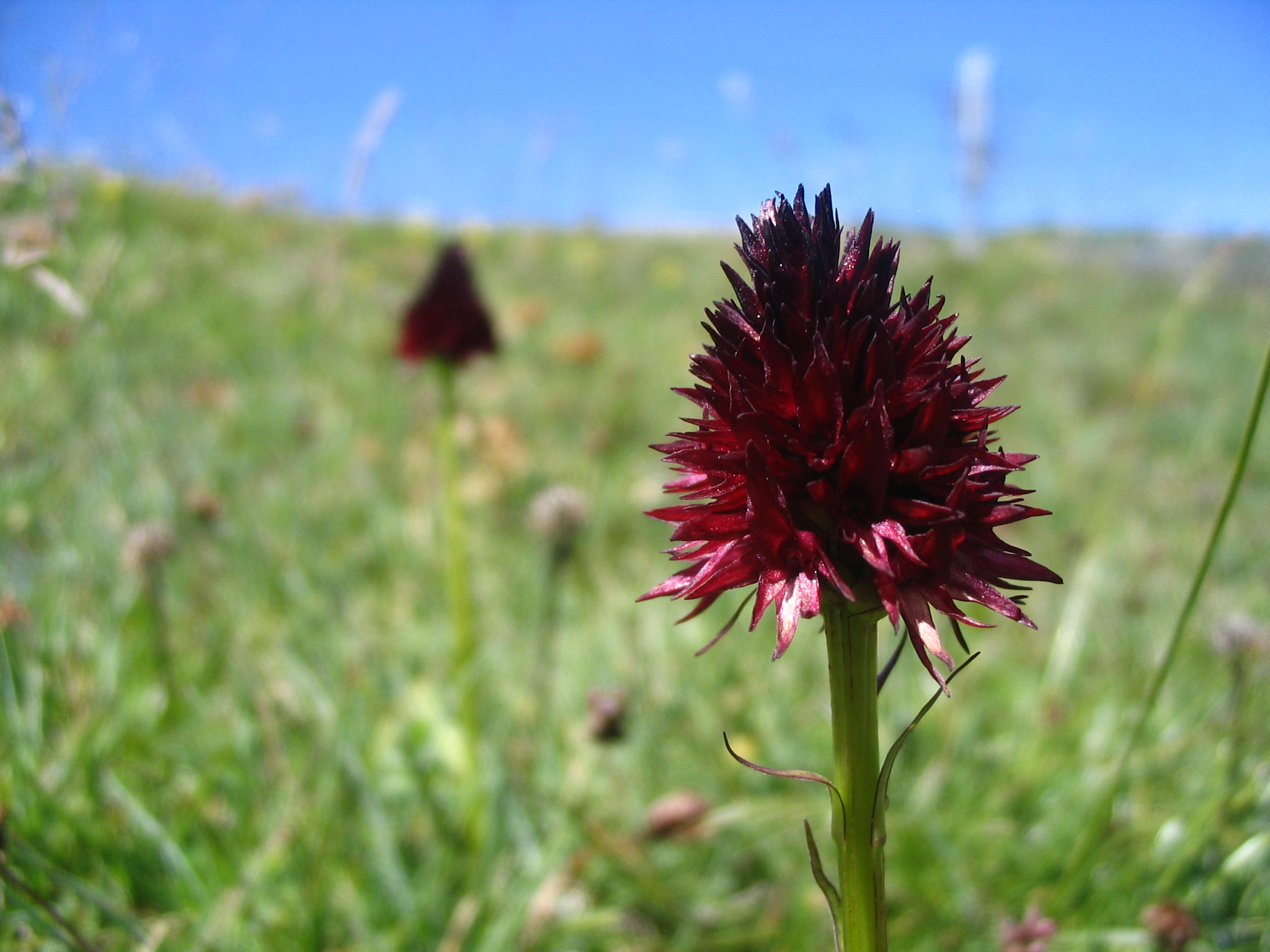 Nigritelle noire Nigritella rhellicani dans les alpages du Mont Margeriaz (Savoie)